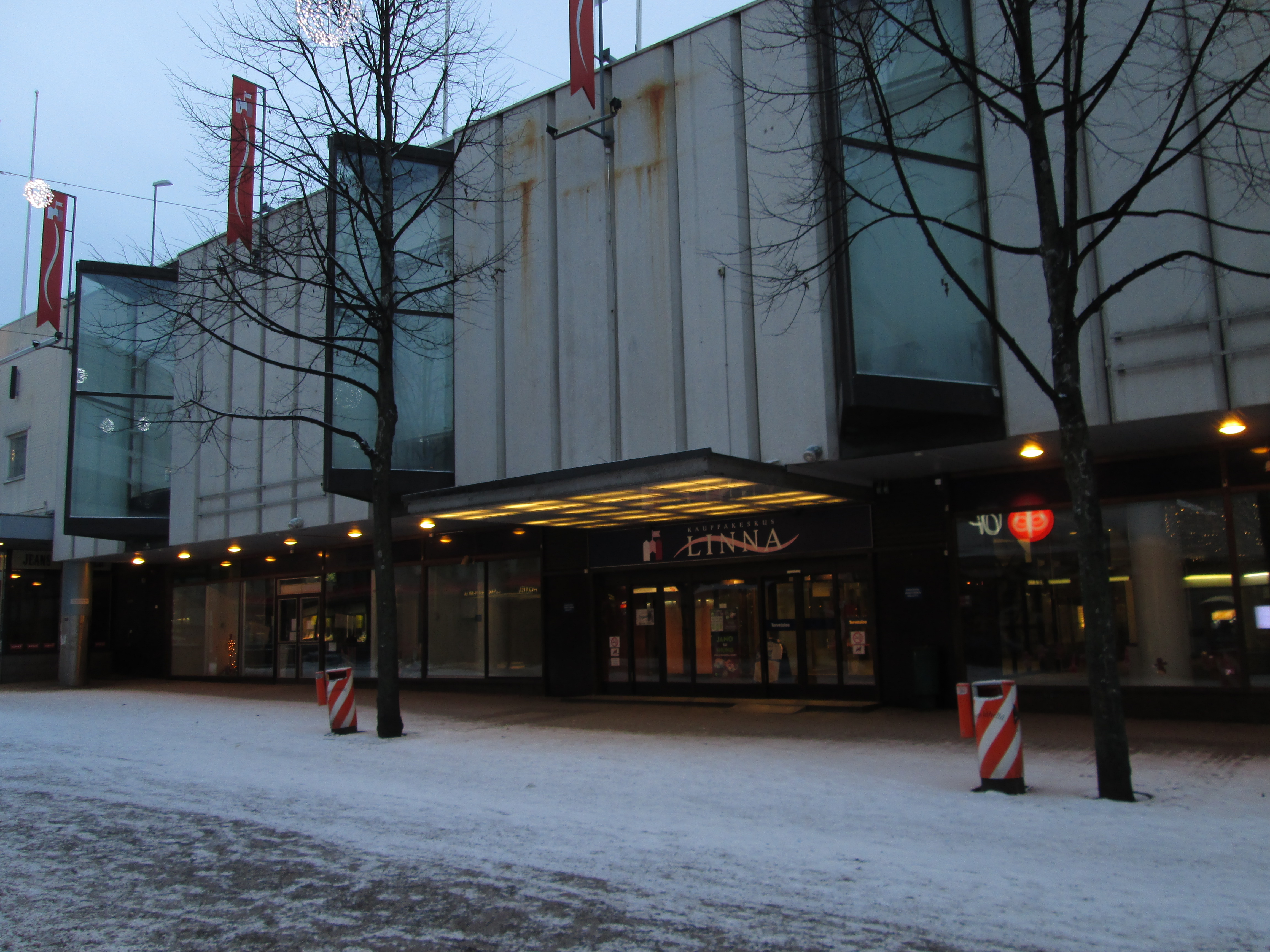 Kauppakeskus Linnan julkisivua entisen Sokoksen rakennuksen kohdalla Hämeenlinnan Raatihuoneenkadulla